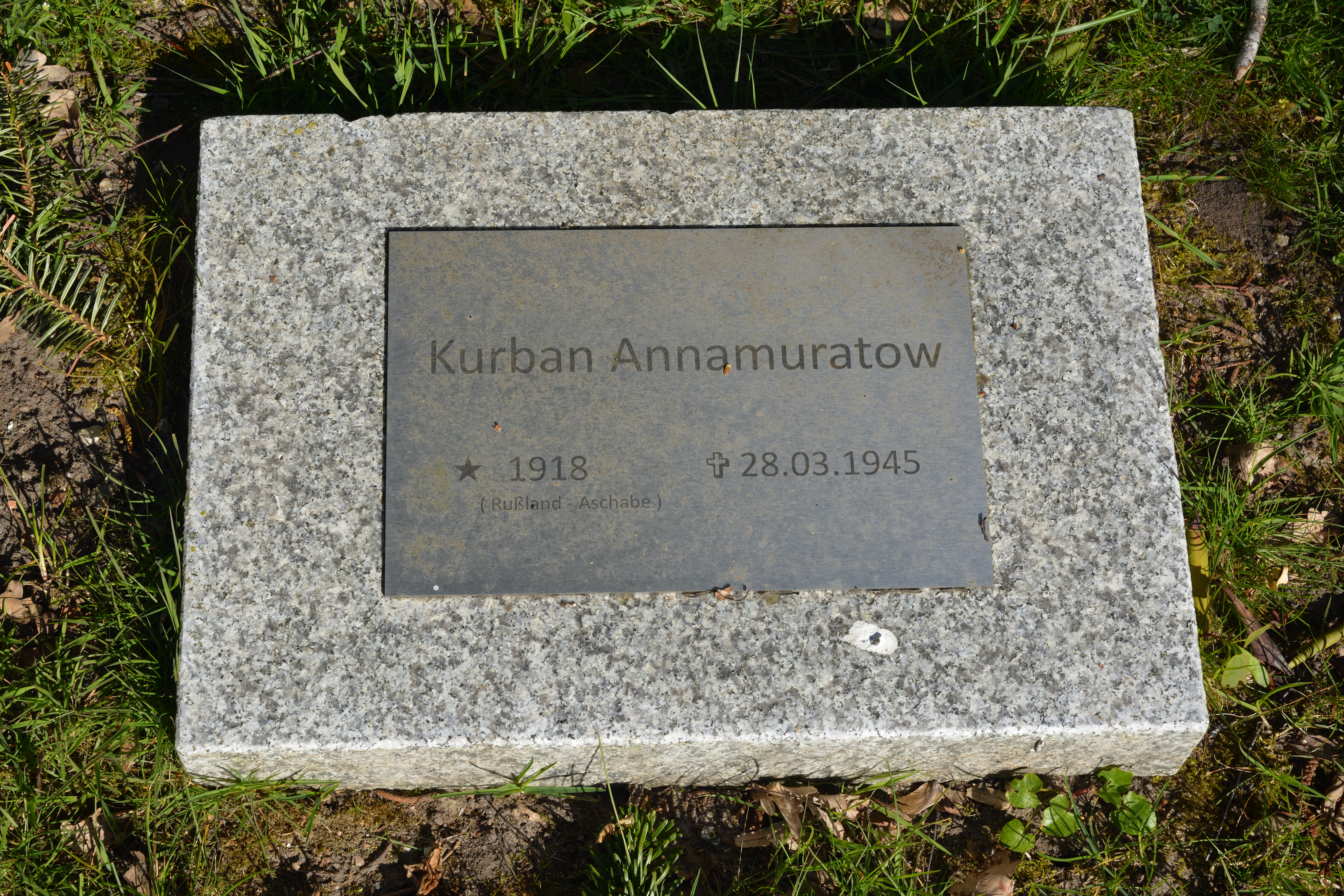 Bilder vom Friedhof in Aukrug